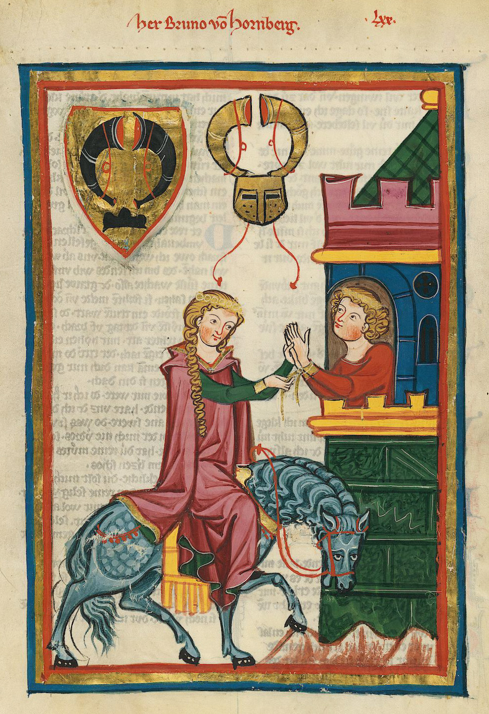 Codex Manesse, UB Heidelberg, Cod. Pal. germ. 848, fol. 251r: Herr Bruno von Hornberg